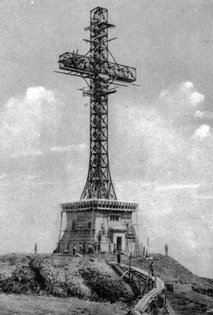 Crucea Eroilor de pe Caraiman în timpul construcției. Imaginea a apărut și în Ziarul Ceferist nr. 12/15 septembrie 1927